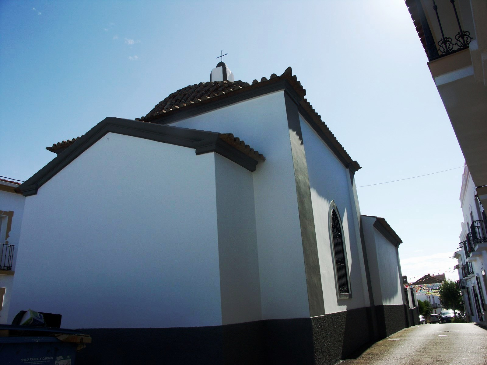 Cheles